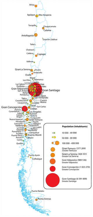 Ciudades